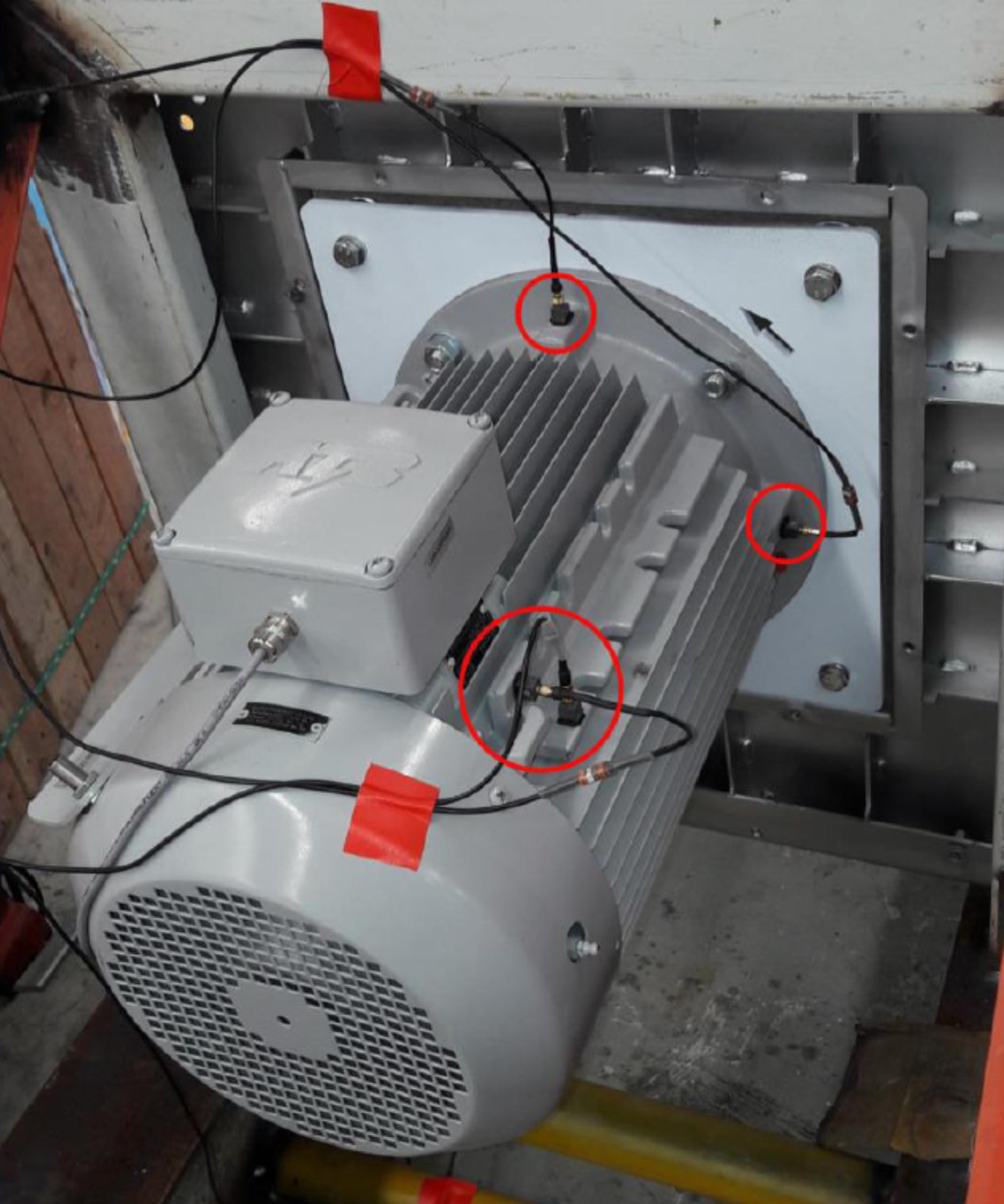 Schwingungsmessung an Motor zum Betriebswuchten.